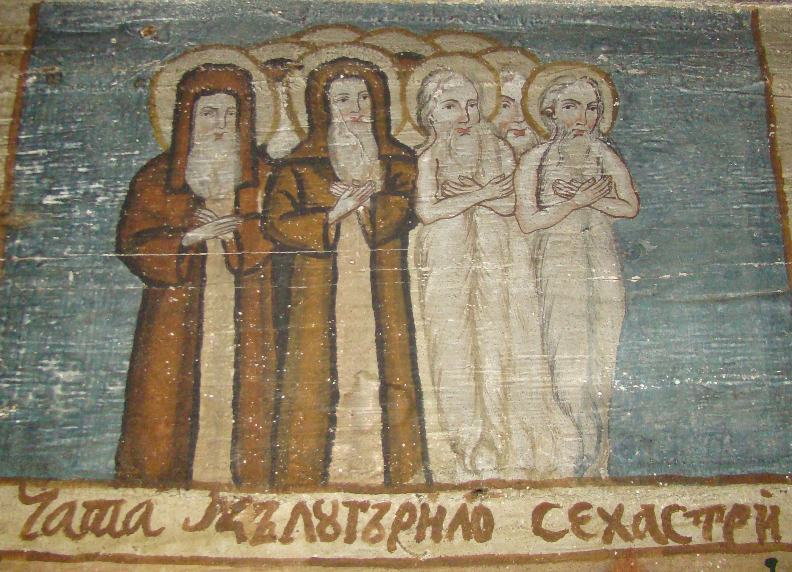 Biserica de lemn "Cuvioasa Paraschiva" , sat POIENILE IZEI; pronaos - ceata Sfinților Ierarhi